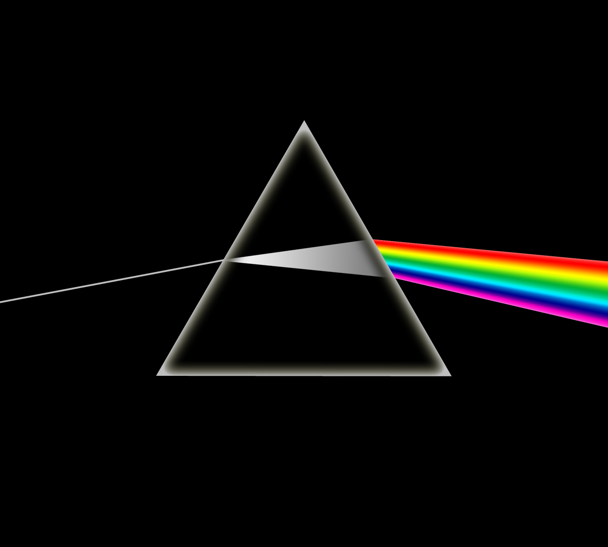 Дисперсия света, возникающая при прохождении белого луча через призму.